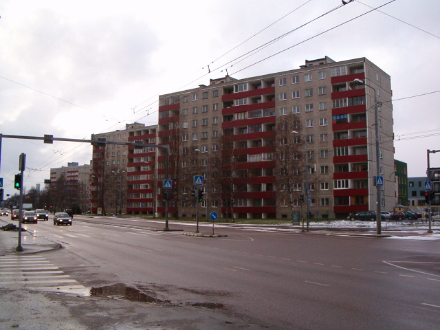 Laki I kvartal (Kadaka asum). Mustamäe tee äärsed 9-korruselised kortermajad, tüüp 1-515/9M. Tallinn.